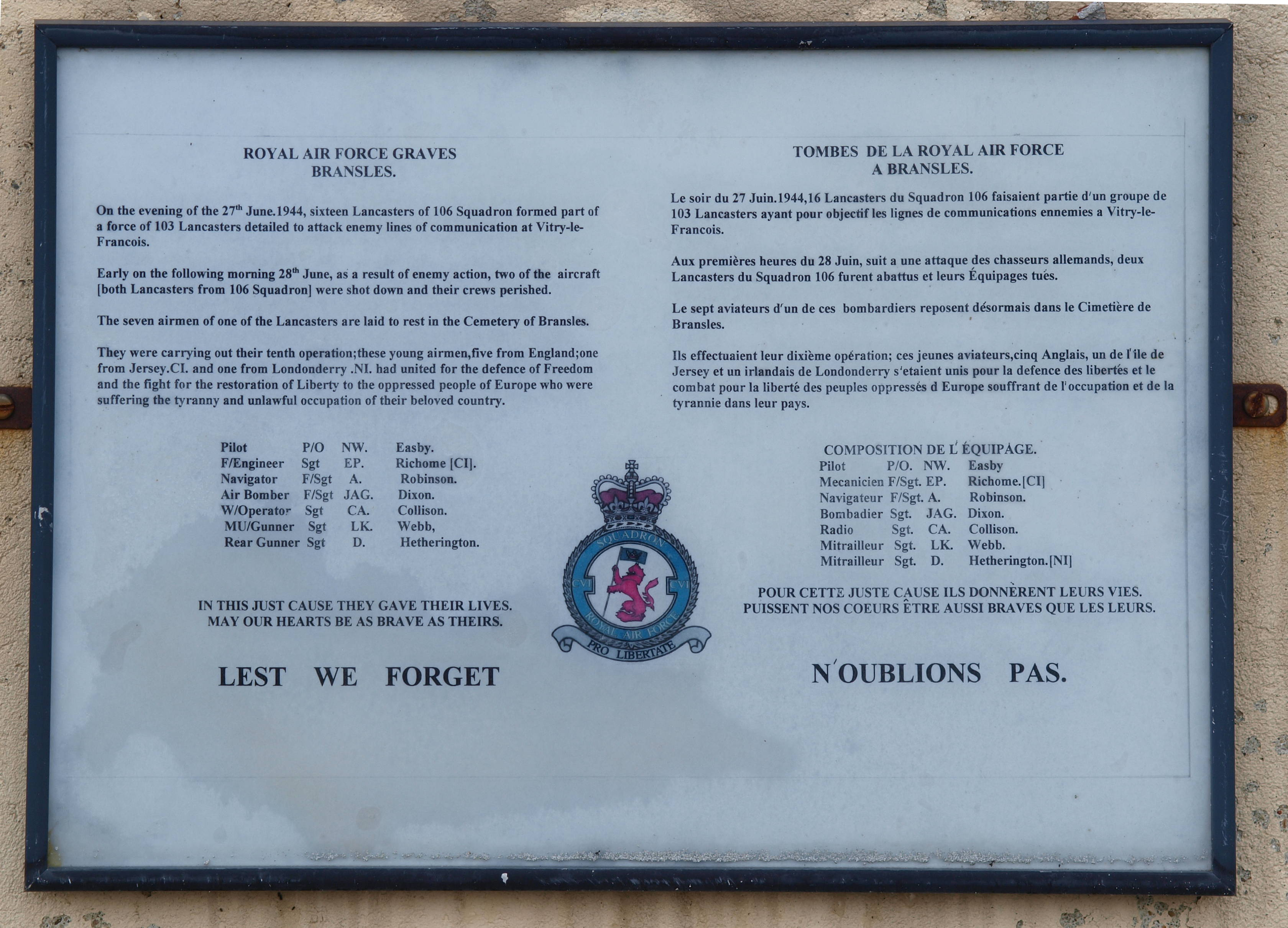 Bransles (Seine & Marne, France) ; Au cimetière ; des sépultures militaires d'aviateurs (1944).